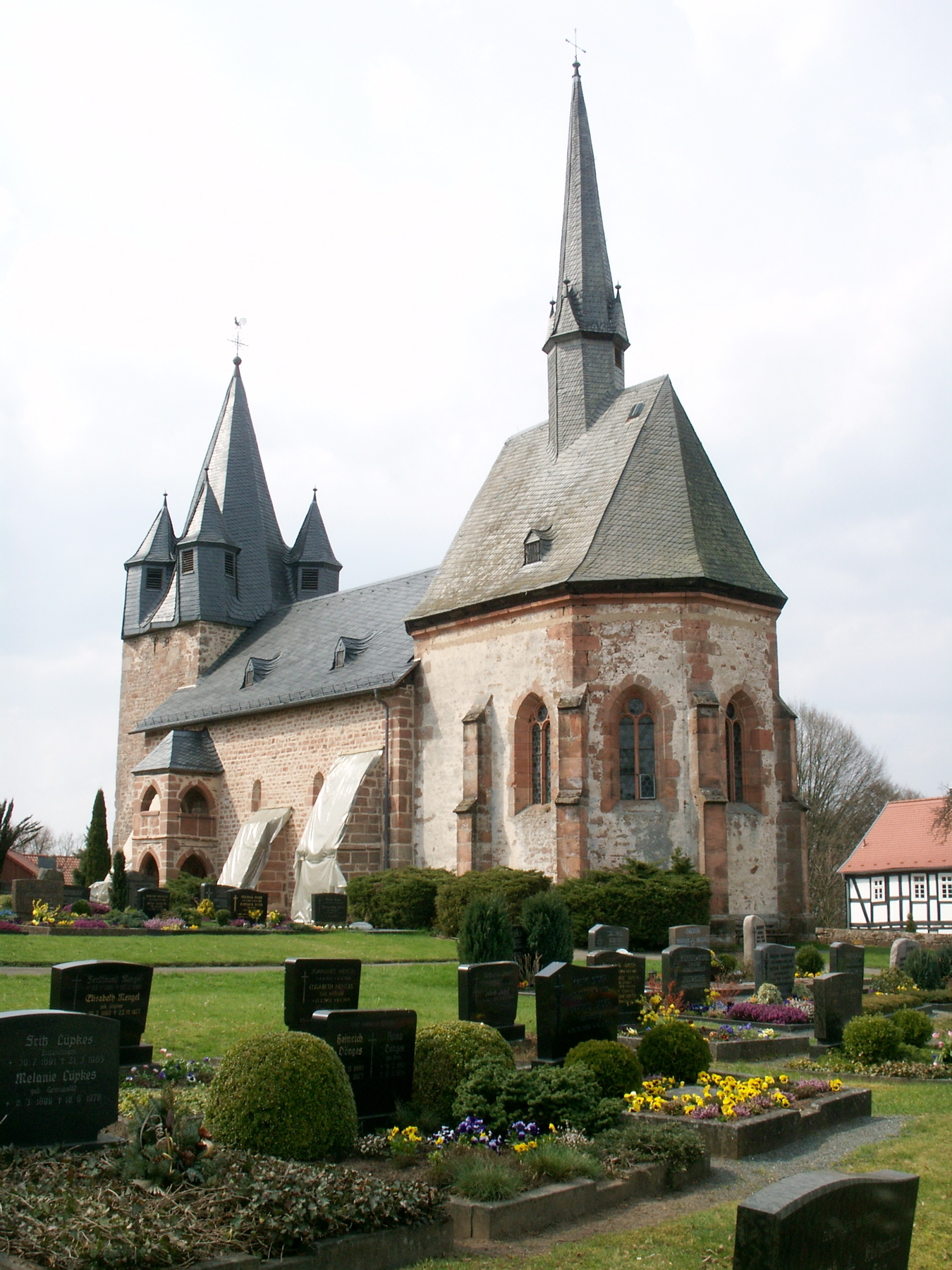 Saint Martin's church on Christenberg hill near Münchhausen, Germany